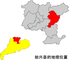 内容介绍：始兴县在韶关地图上的标示 原创者：zhuwq 创作日期：2005年1月 创作方法：将广东地图用扫描仪输入电脑，再将图片导入FLASH，用画笔描出轮廓，着填充，删除原图片，导出JPG图象便大工告成，这样制作的优点是，开始辛苦了点，但绘制别的县市便替换颜色即可。